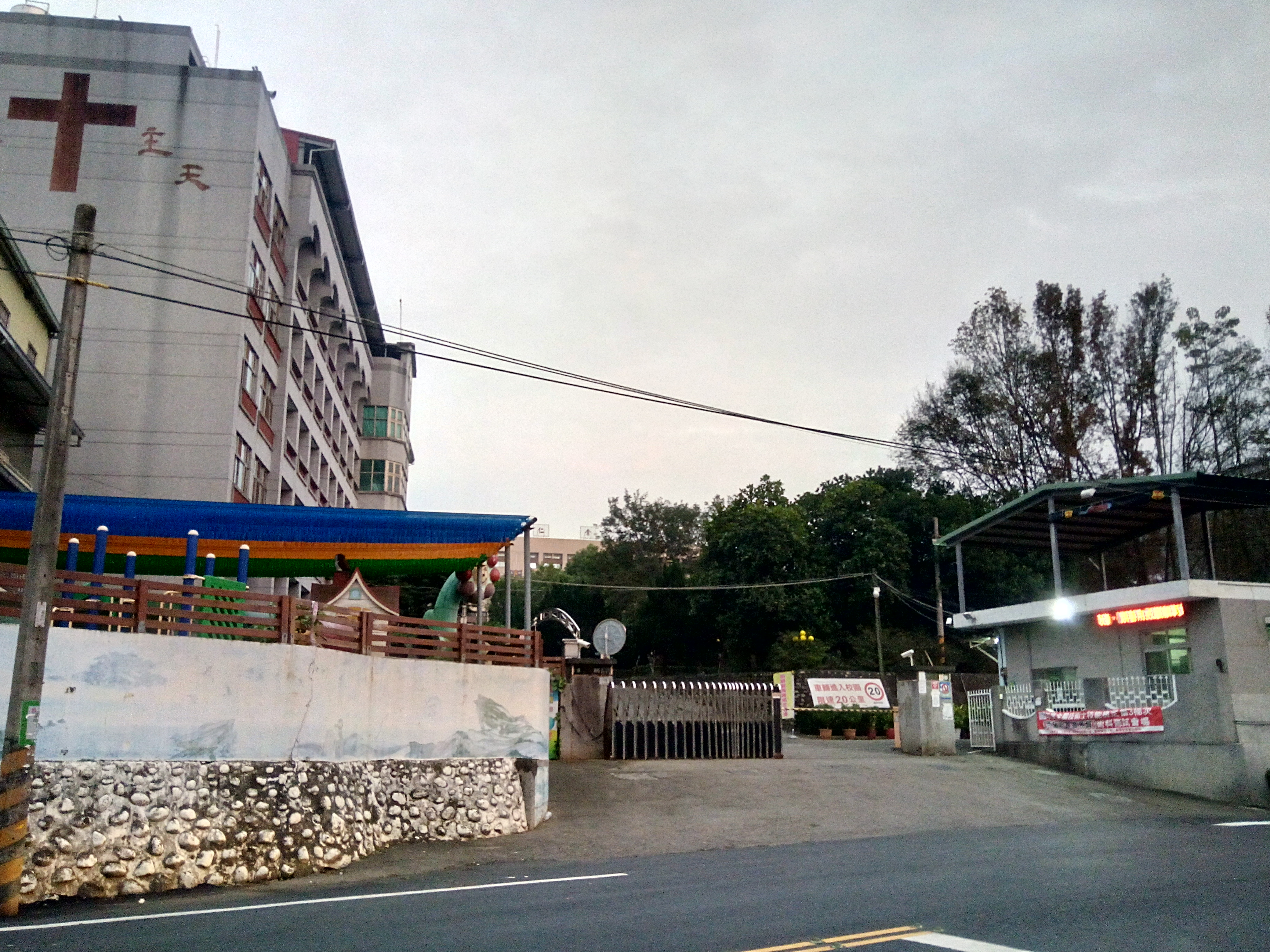 崇仁医護管理専科学校の正門（嘉義キャンパス）